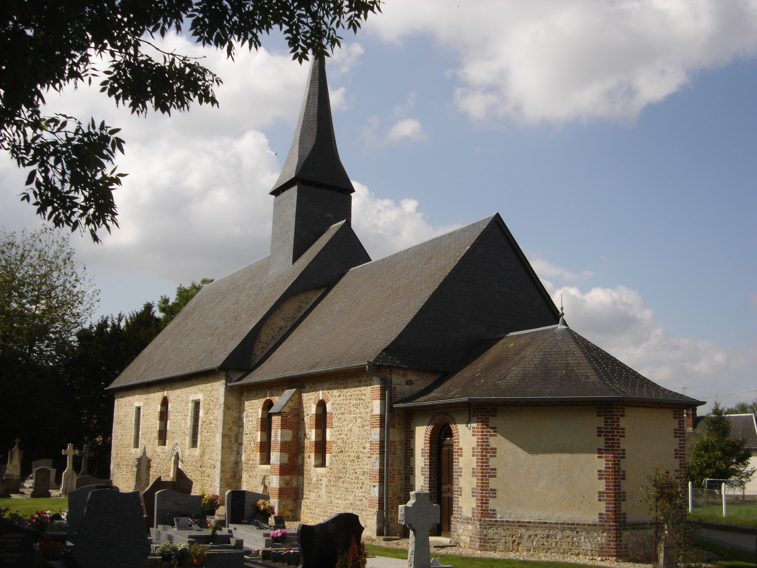 Eglise de La Noë-Poulain (Eure, Normandie, France)